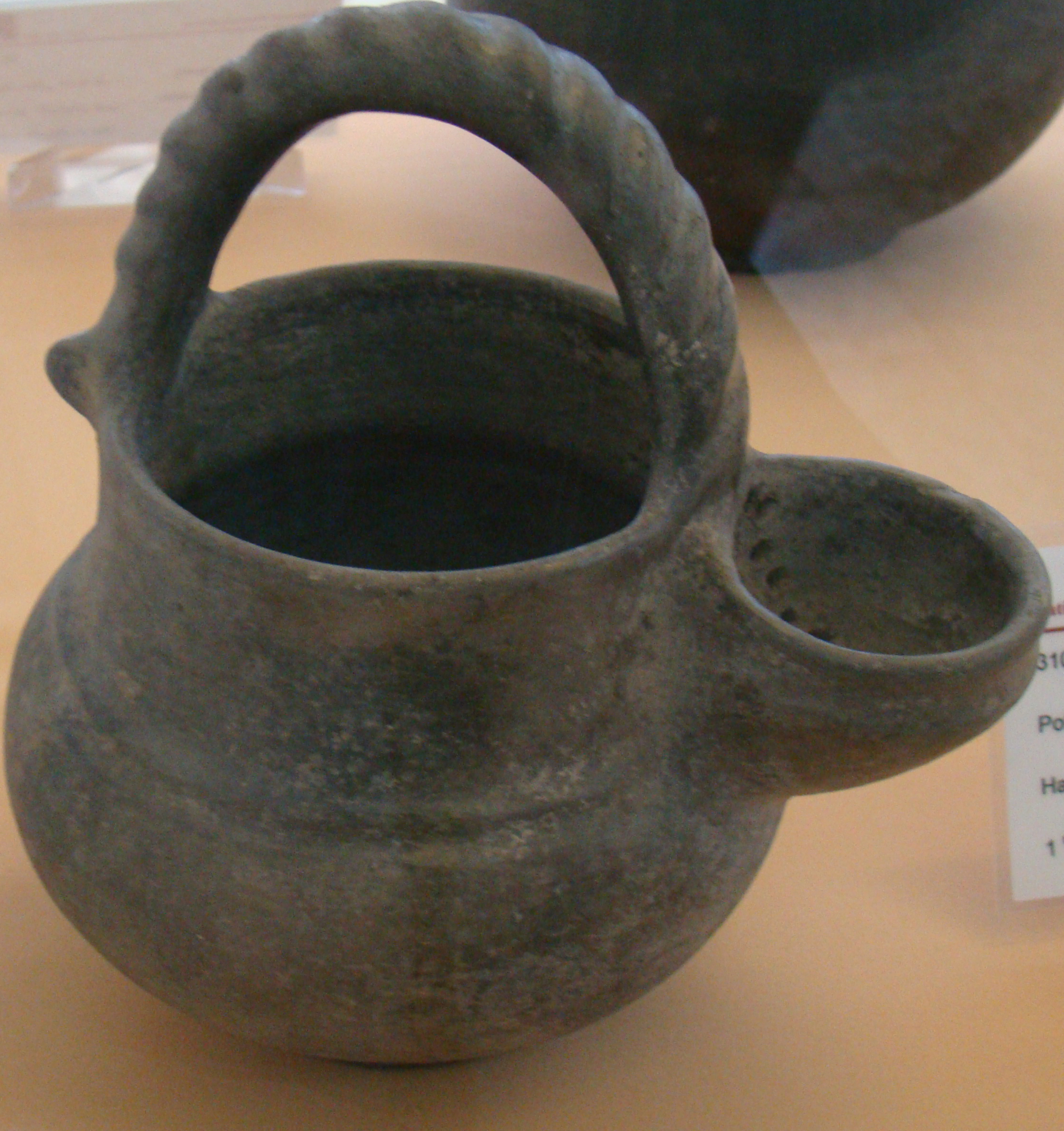 قوری یافت شده در تپه حسنلو (آذربایجان ایران) مربوط به هزاره اول پیش از میلادAncient Teapot Funded in Iran. First Millenium B.C.